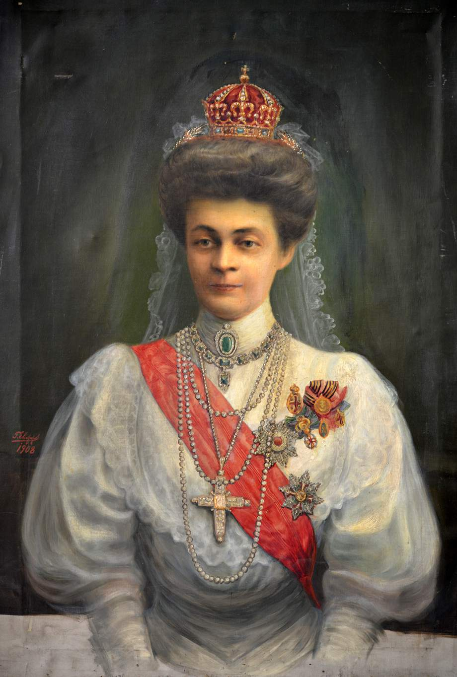 Георги Евстатиев. Портрет на царица Елеонора. 1908 г. Техника: маслени бои Материал: платно Размер в см: 116/80 Произход: Колекция от портрети